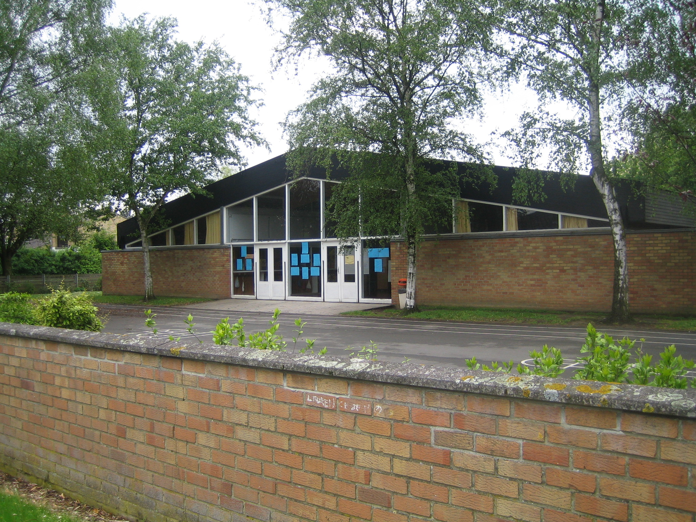 Ecole maternelle Léonard de Vinci, à Villeneuve d'Ascq